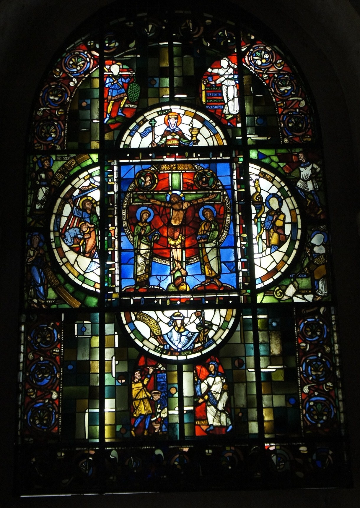 Vue du vitrail de la Rédemption, crée en 1155, se trouvant dans le trésor de la cathédrale.